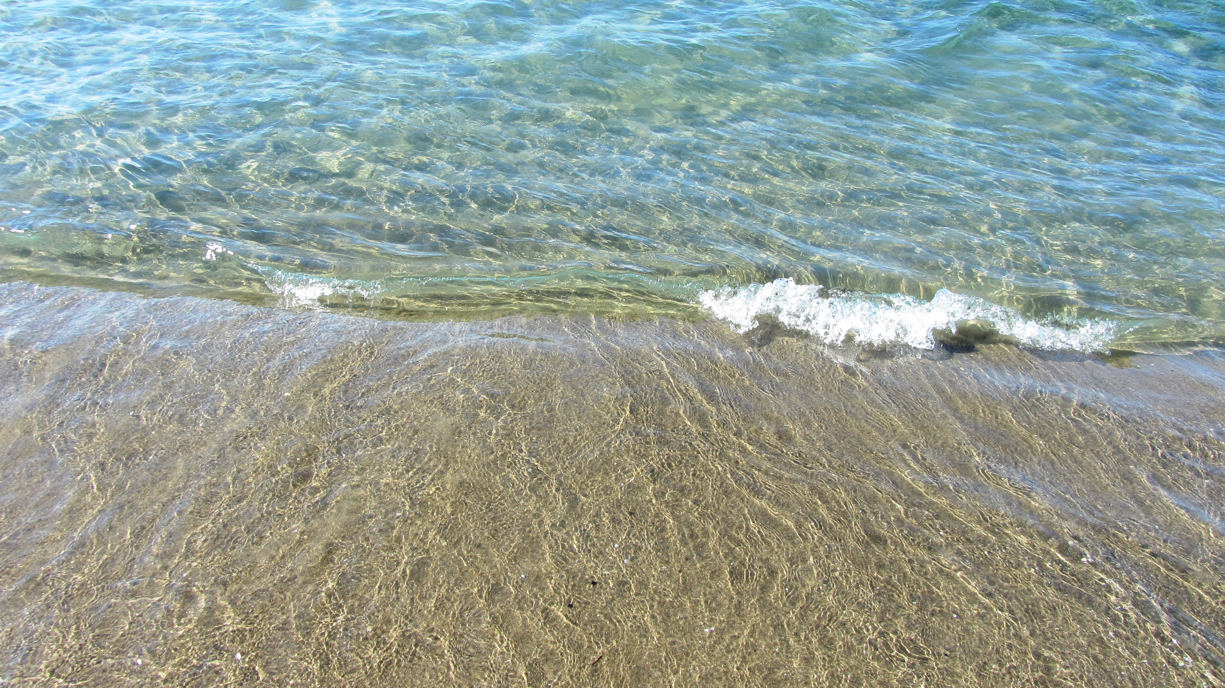 Rocchette - Castiglione della Pescaia (GR). Dettaglio del mare lungo la spiaggia delle Rocchette